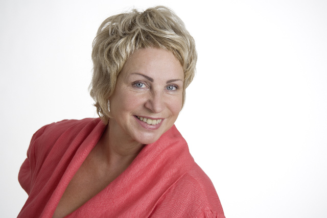 Helen Lauff Portrait